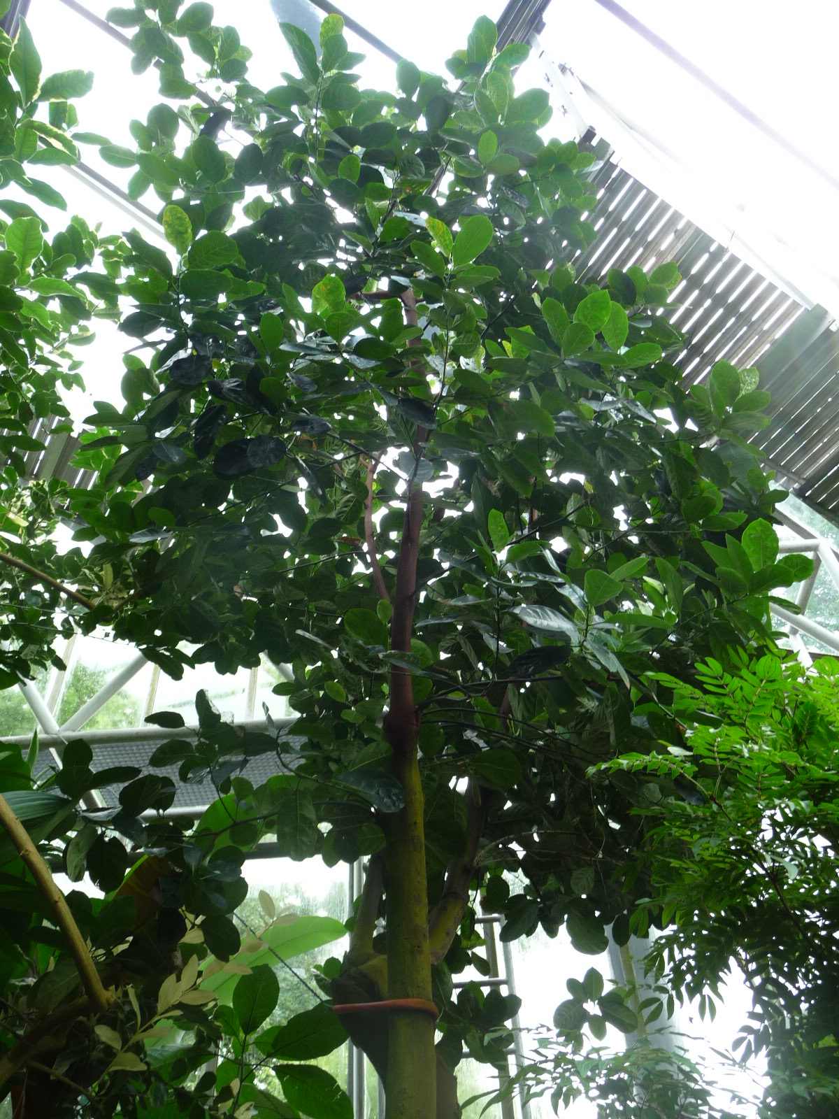 Fiatal jákafa (Artocarpus heterophyllus 'Jack-Baum') (Hamburgi pálmaház)